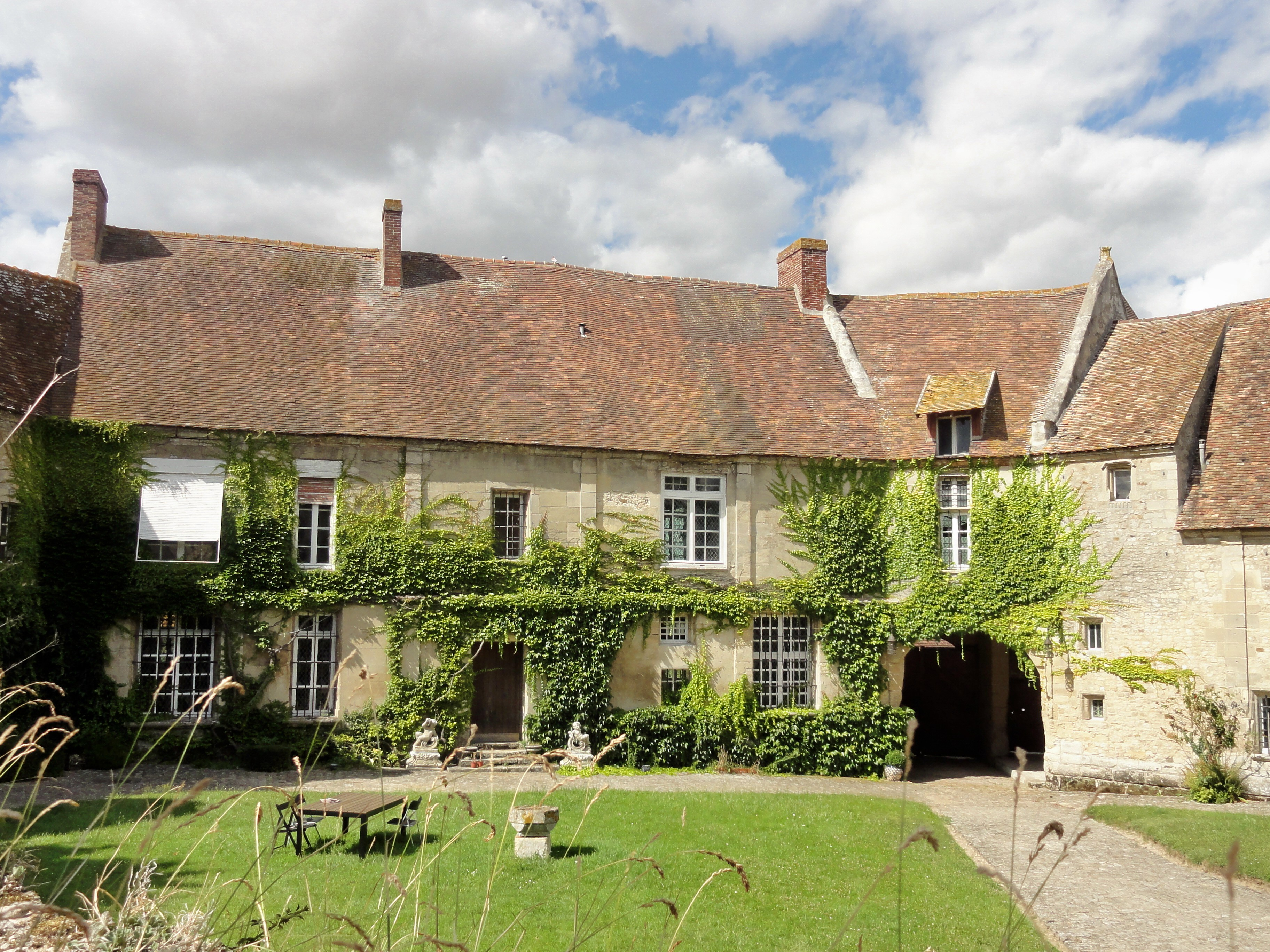 Ancien manoir.